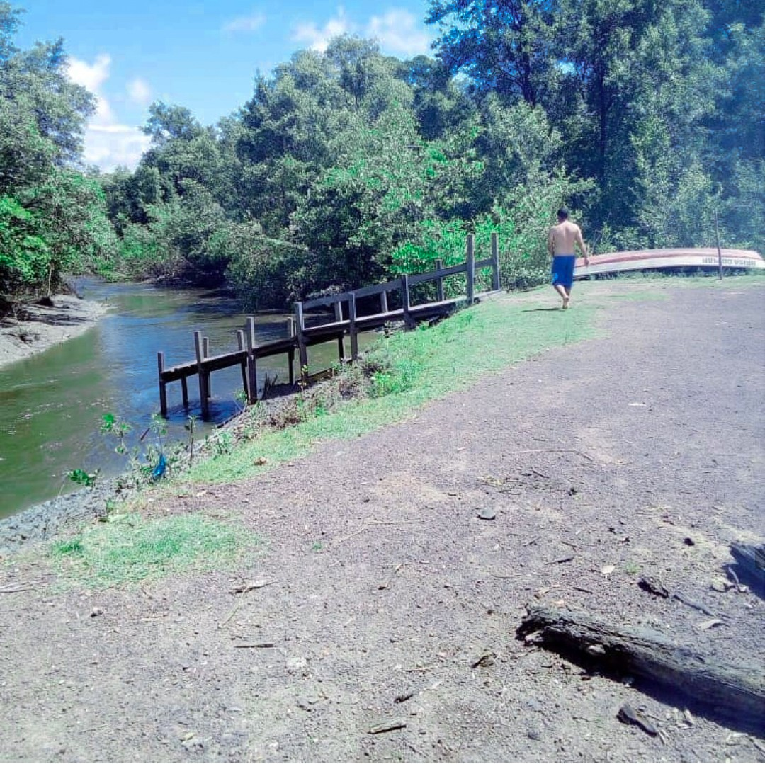 área verde